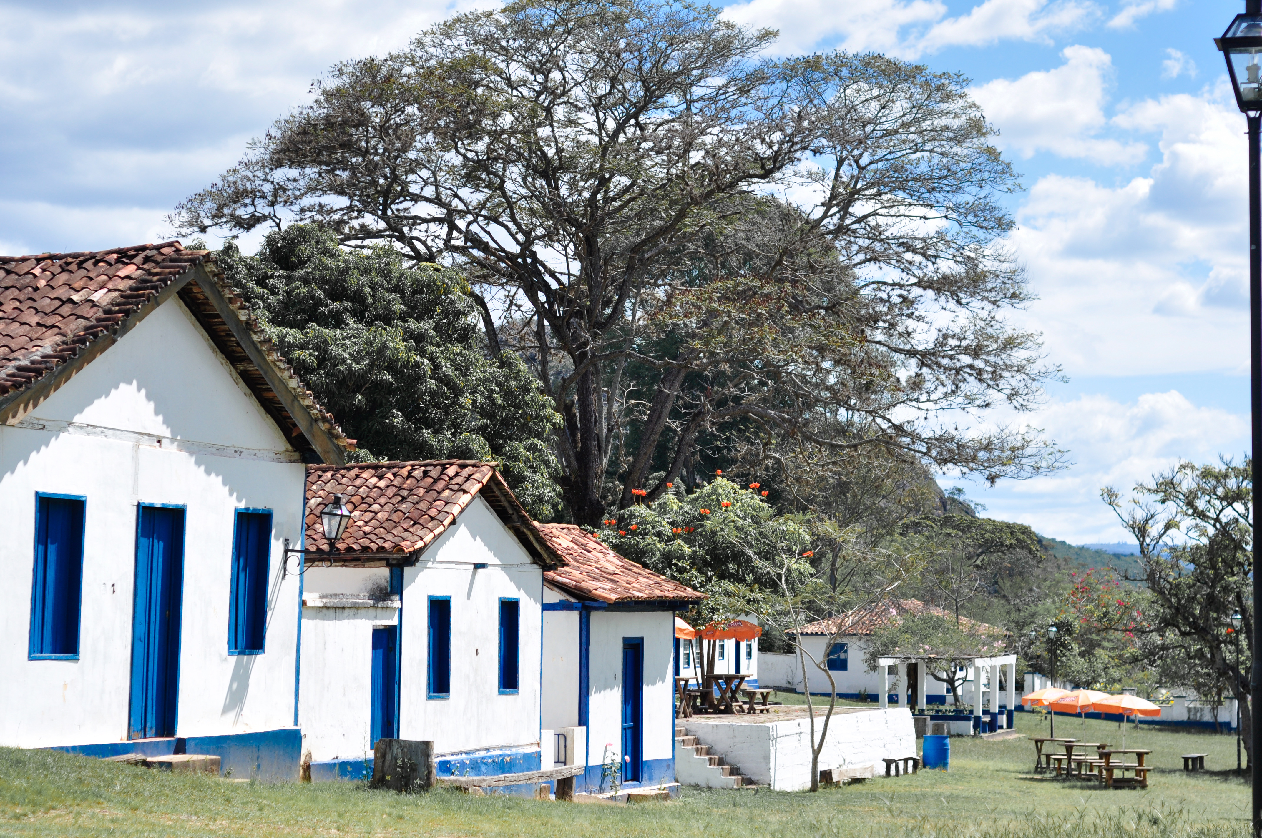 Vila de biribiri.